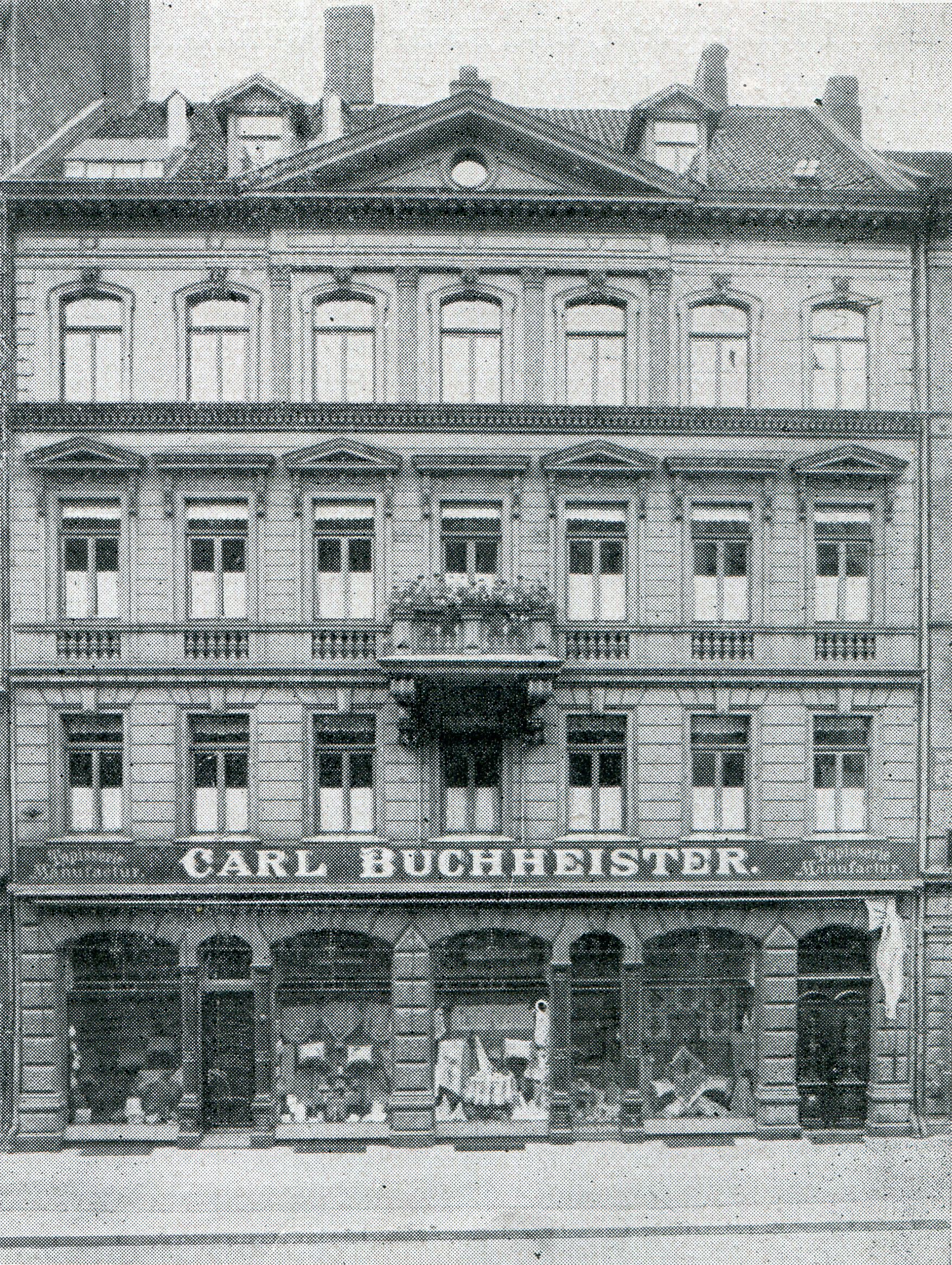 Das "Spezial-Geschäft für Handarbeiten und Hauskunst" „Carl Buchheister, Tapisserie-Manufactur“ hatte seinen seinen Sitz ab 1896 in dem neoklassizistischen Gebäude Grupenstraße 24 (die spätere Karmarschstraße) in Hannover. Nachdem das Unternehmen zunächst nur das Erdgeschoss mit seinen Schaufensterläden genutzt hatte, nahm es 1910 das gesamte Gebäude ein. Mit seinen rund 100 Mitarbeitern war es das größte Spezialgeschäft seiner Art in Deutschland ...